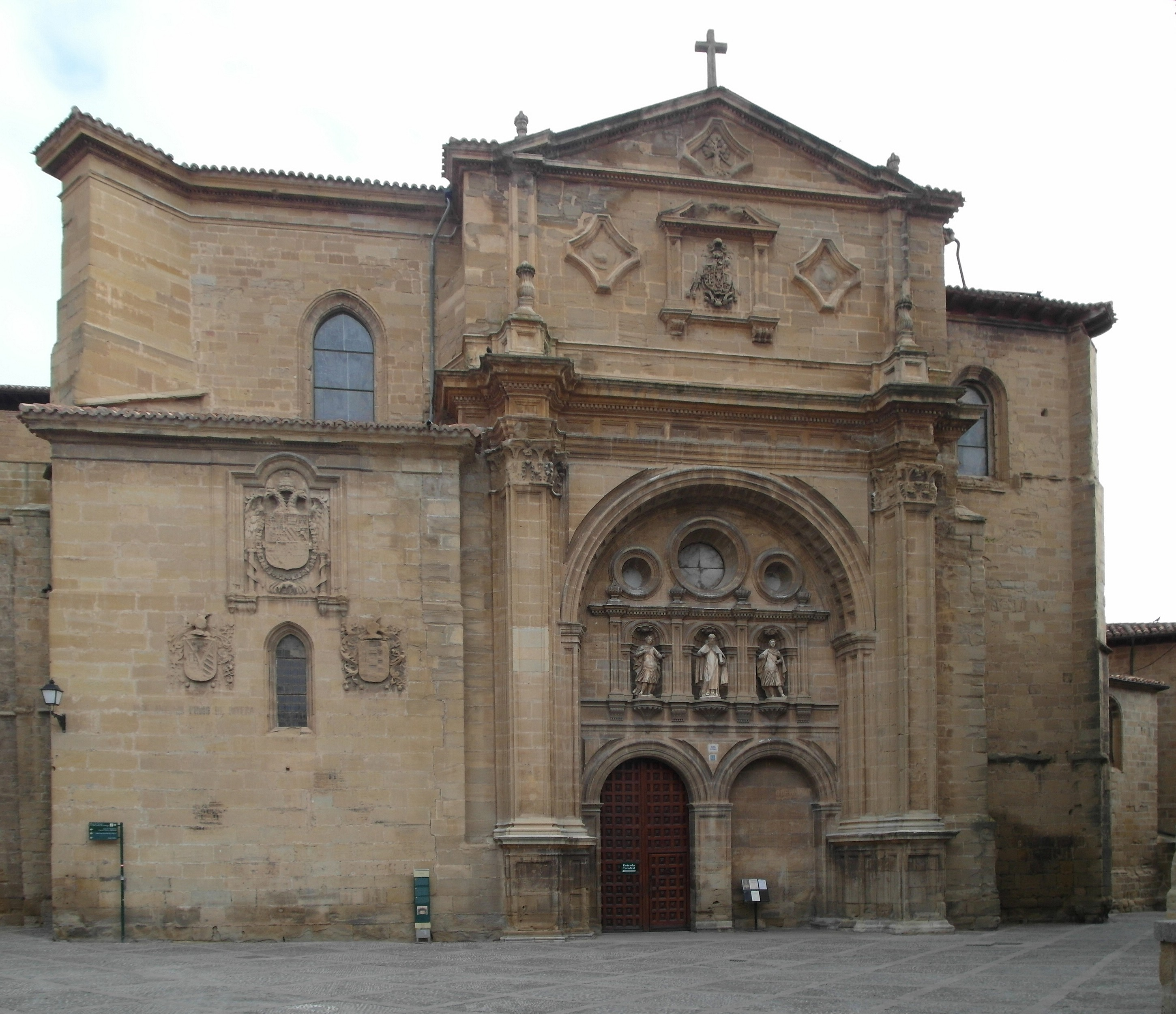 Catedral de Santo Domingo de la Calzada, La Rioja.